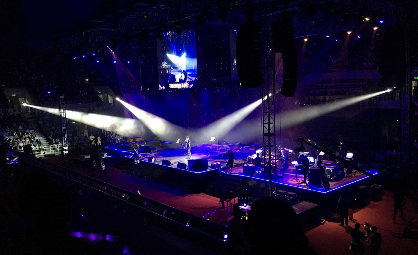 李健在清華校慶開演唱會